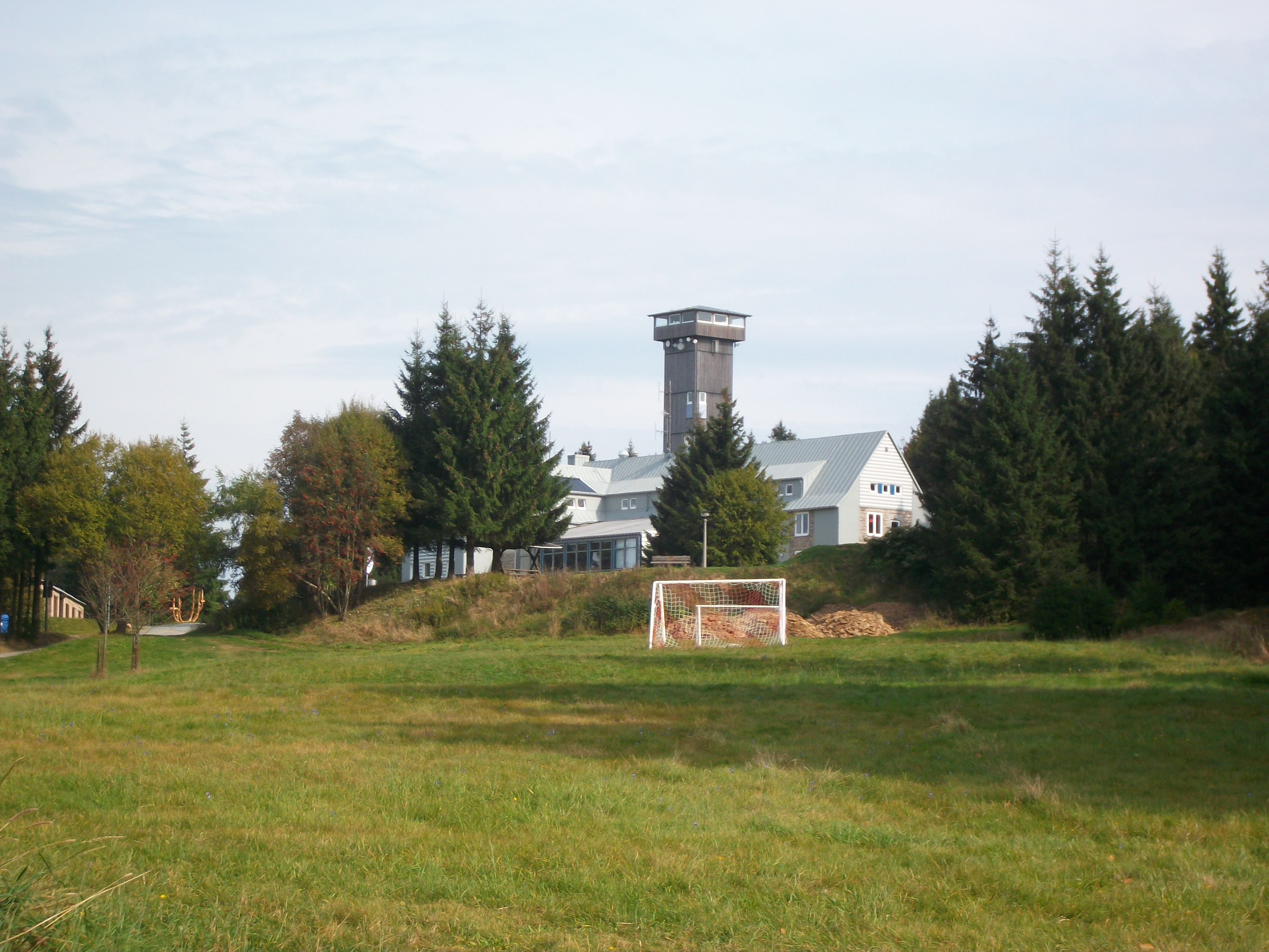 Klingenthal, Aschbergturm mit DJH